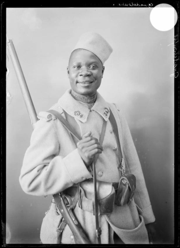 Soldat guadeloupéen du 34e régiment d'infanterie en 1916